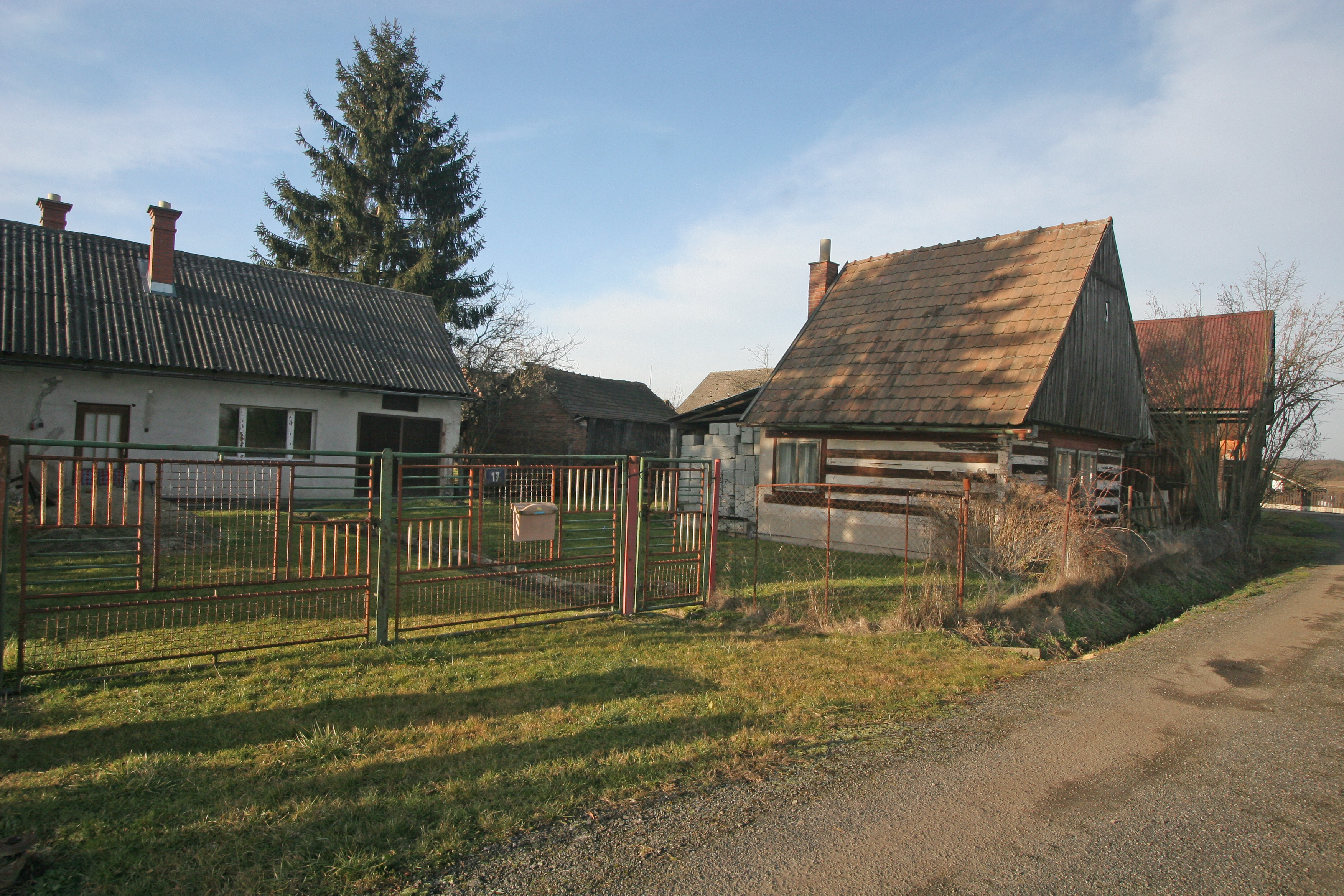 Kanice - výminek u čp. 17